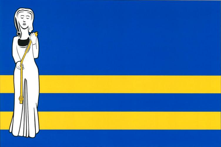 vlajka, Mokošín, okres Pardubice